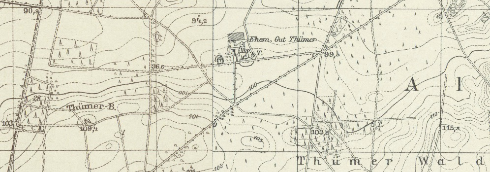 Ausschnitt von Thümer aus den Messtischblättern Nr. 2103 (Loburg) und 2104 (Altengrabow), 1:25.000